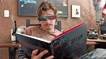 Simón Brauer, Quito Profundo 2010